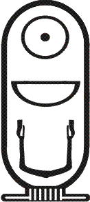 Kartuschenname "Nebkare" in der Sakkara-Liste